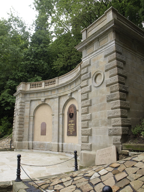 Ludwig Ringel Denkmal, Barmer Anlagen in Wuppertal